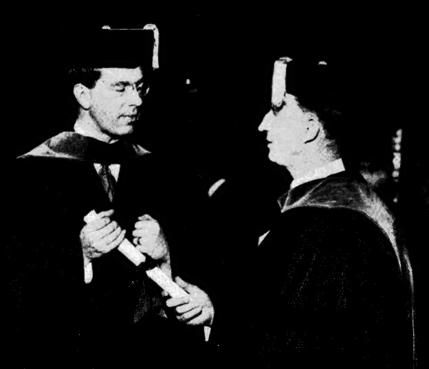 Kronprins Gustaf (VI) Adolf mottar sitt doktorsdiplom som hedersdoktor vid University of Chicago av universitetets president, professor Max Mason.